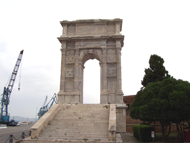 Ancona - Arco di Traiano